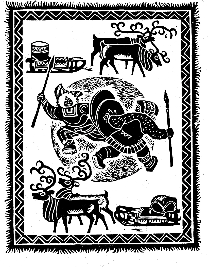 Иллюстрация к книге "Эскимосские сказки и легенды". Художник Д. А. Брюханов